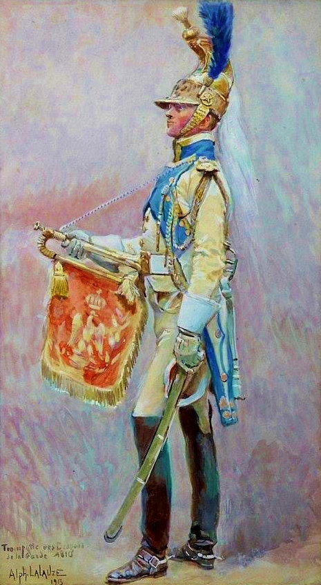 Trompette des dragons de la Garde, 1810. Il porte ici l'uniforme de grande tenue introduit en 1810, habit blanc à revers bleu de ciel. La flamme de la trompette devrait être en soie bleue céleste. La présence d'une aigle couronnée sur la flamme, jugée vraisemblable par Lucien Rousselot, n'est cependant pas absolument certaine.